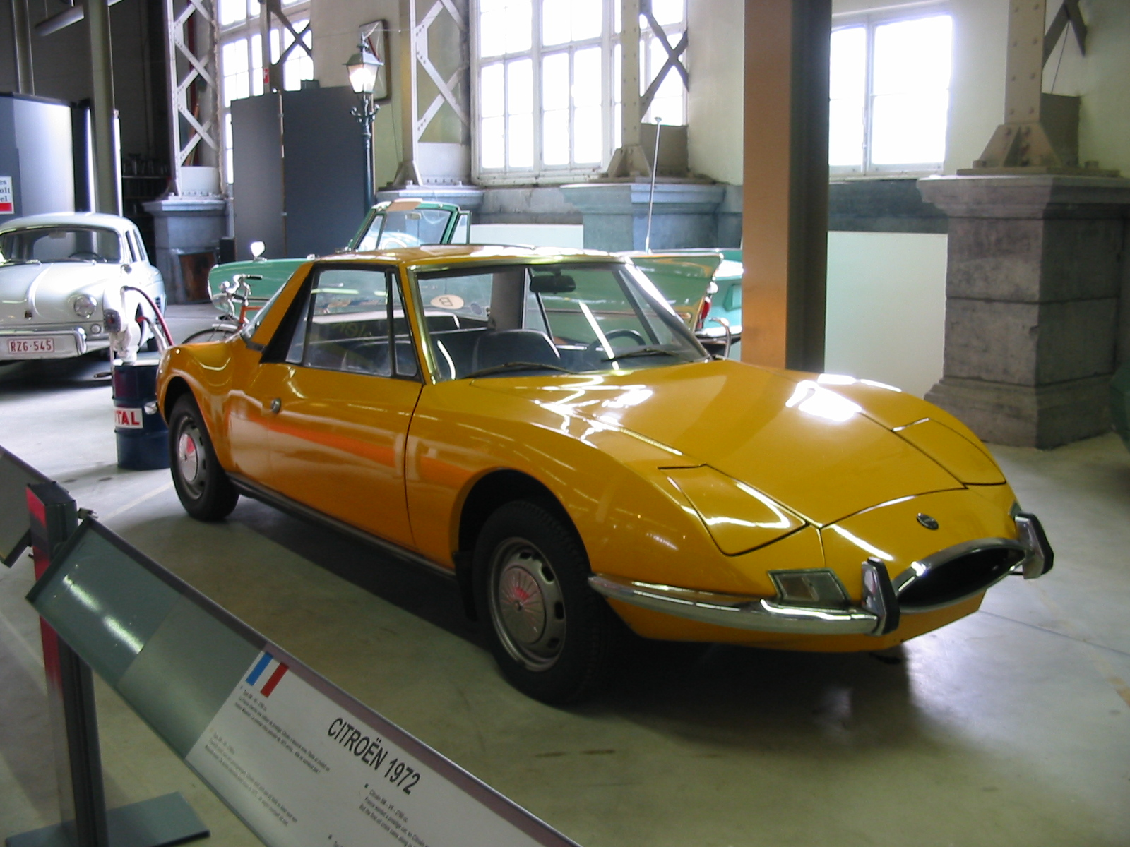 1971 Matra 530LX